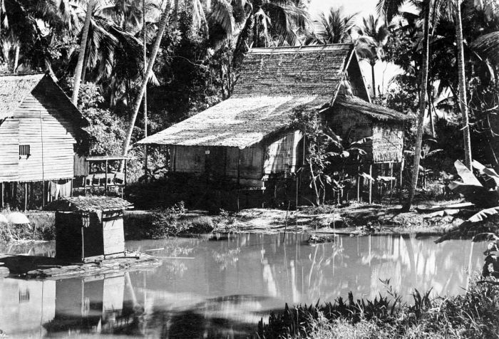 Repronegatief. Paalwoningen langs de rivier, Bandjermasin